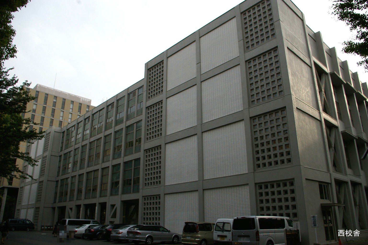 2009.4.東京都港区内で塾生 (talk)が撮影